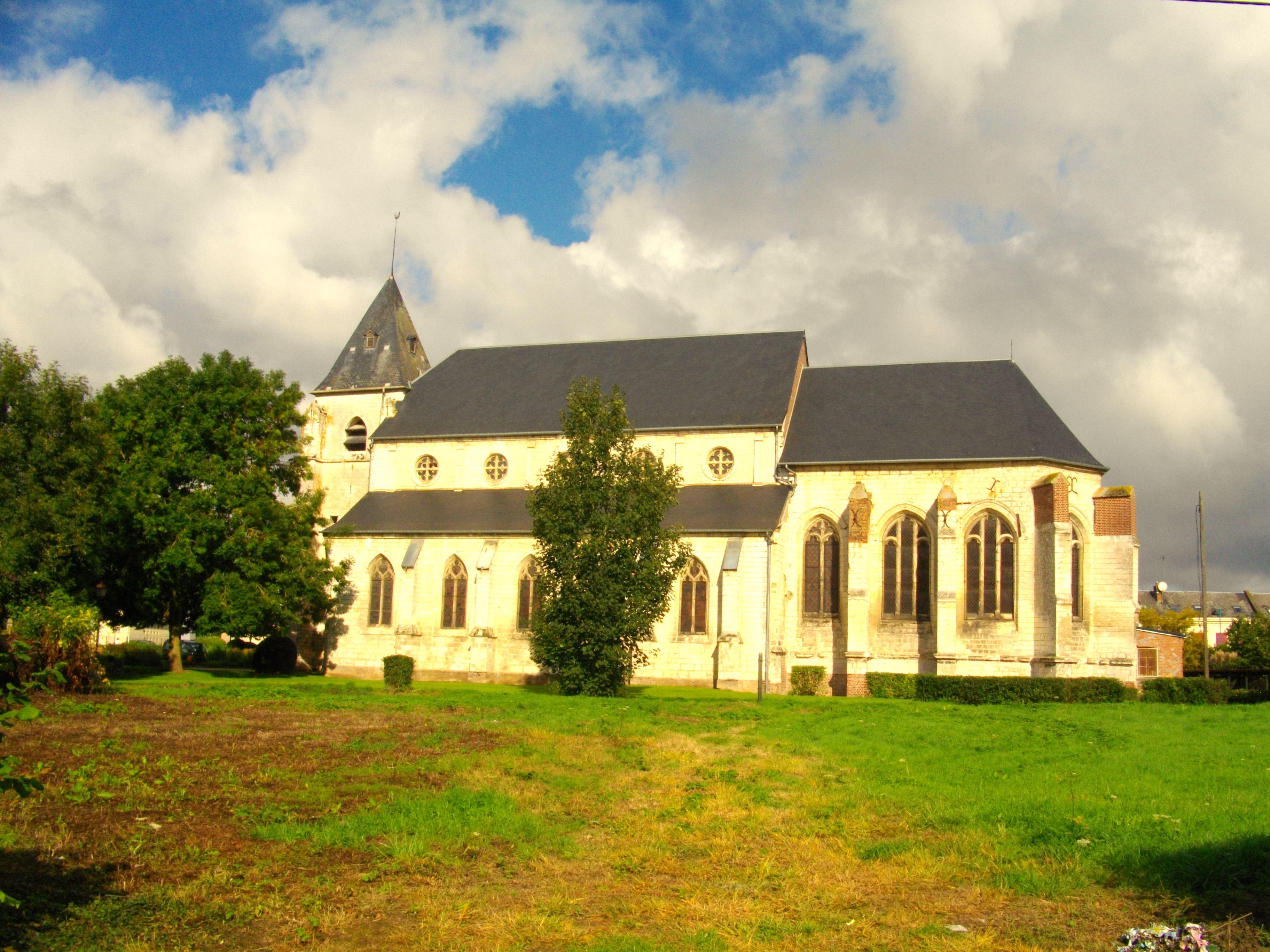 L'église Saint-Martin de Molliens-Dreuil, Somme, France.